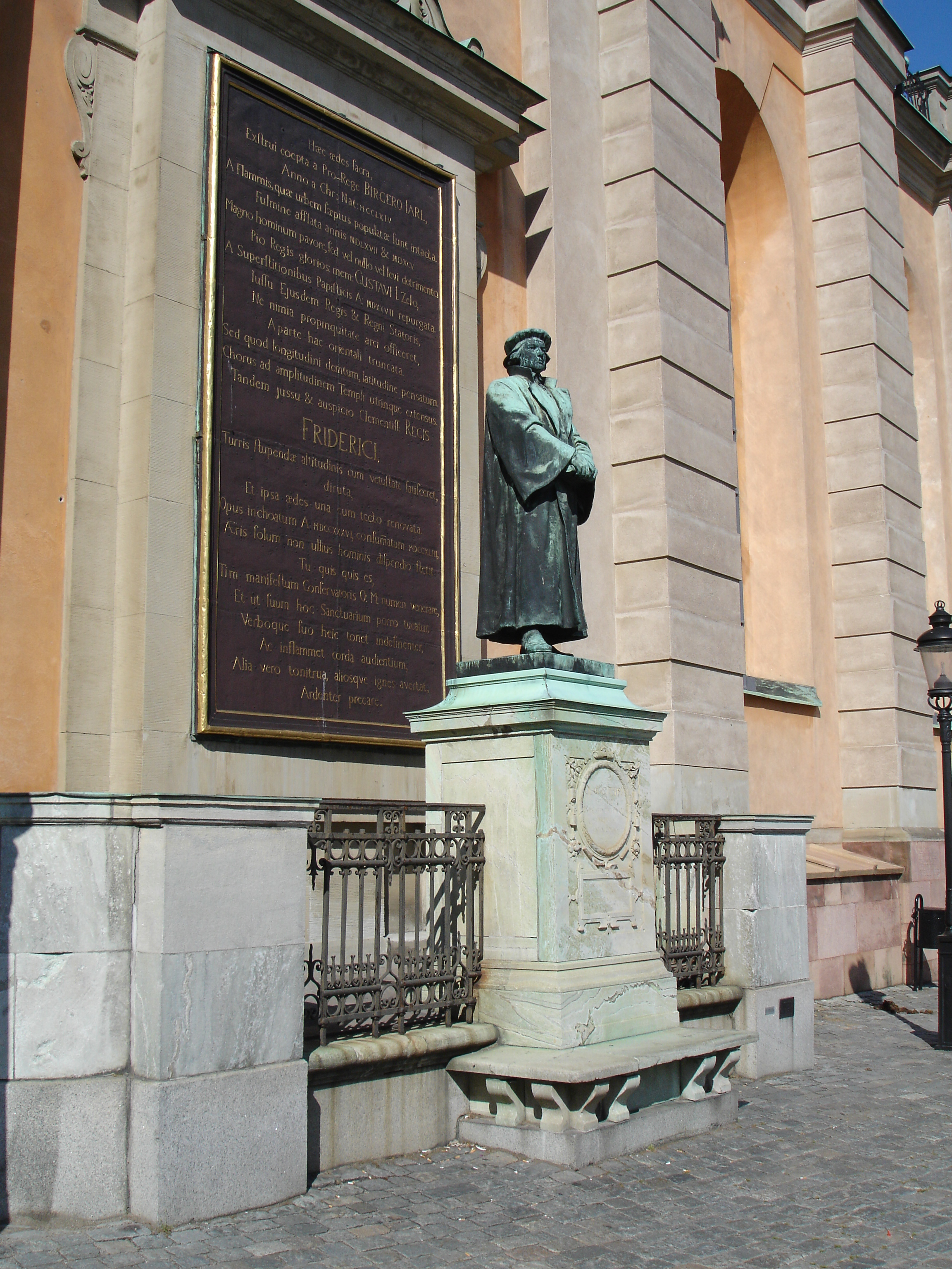 Statue of Olaus Petri at Slottsbacken in Gamla stan, Stockholm.